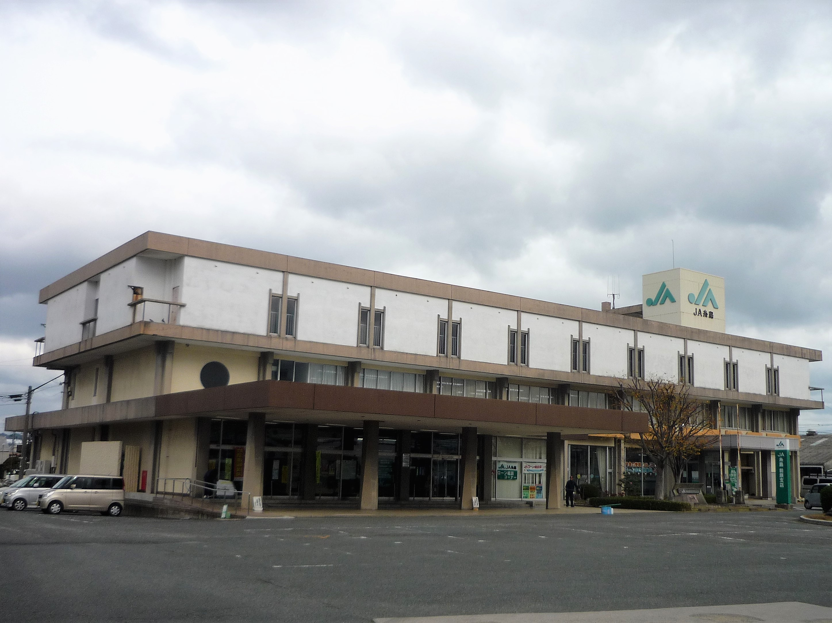 糸島農業協同組合 本店・前原支店（糸島市前原東） Panasonic Lumix DMC-FS3